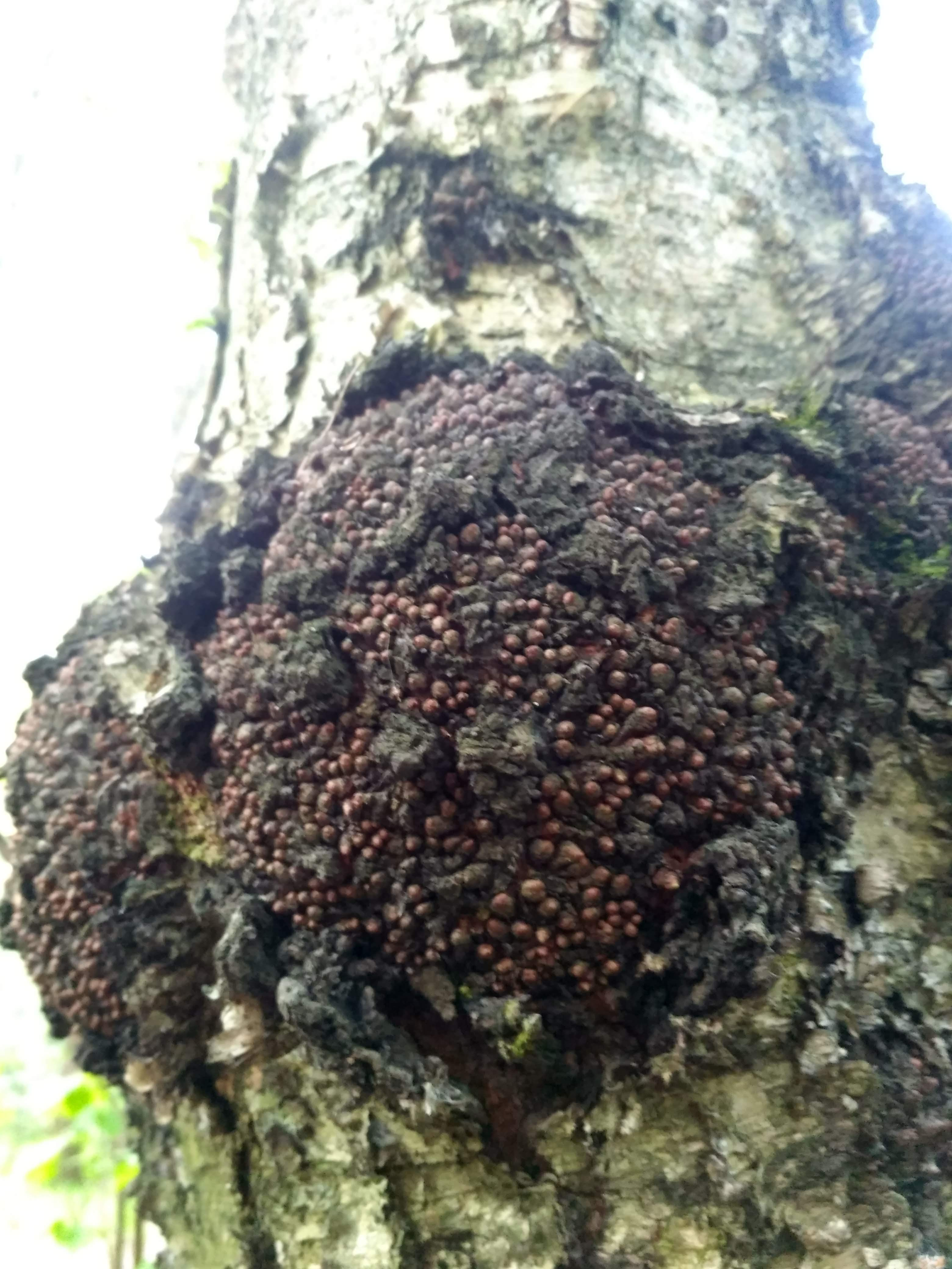 Берёзовый кап в Москве